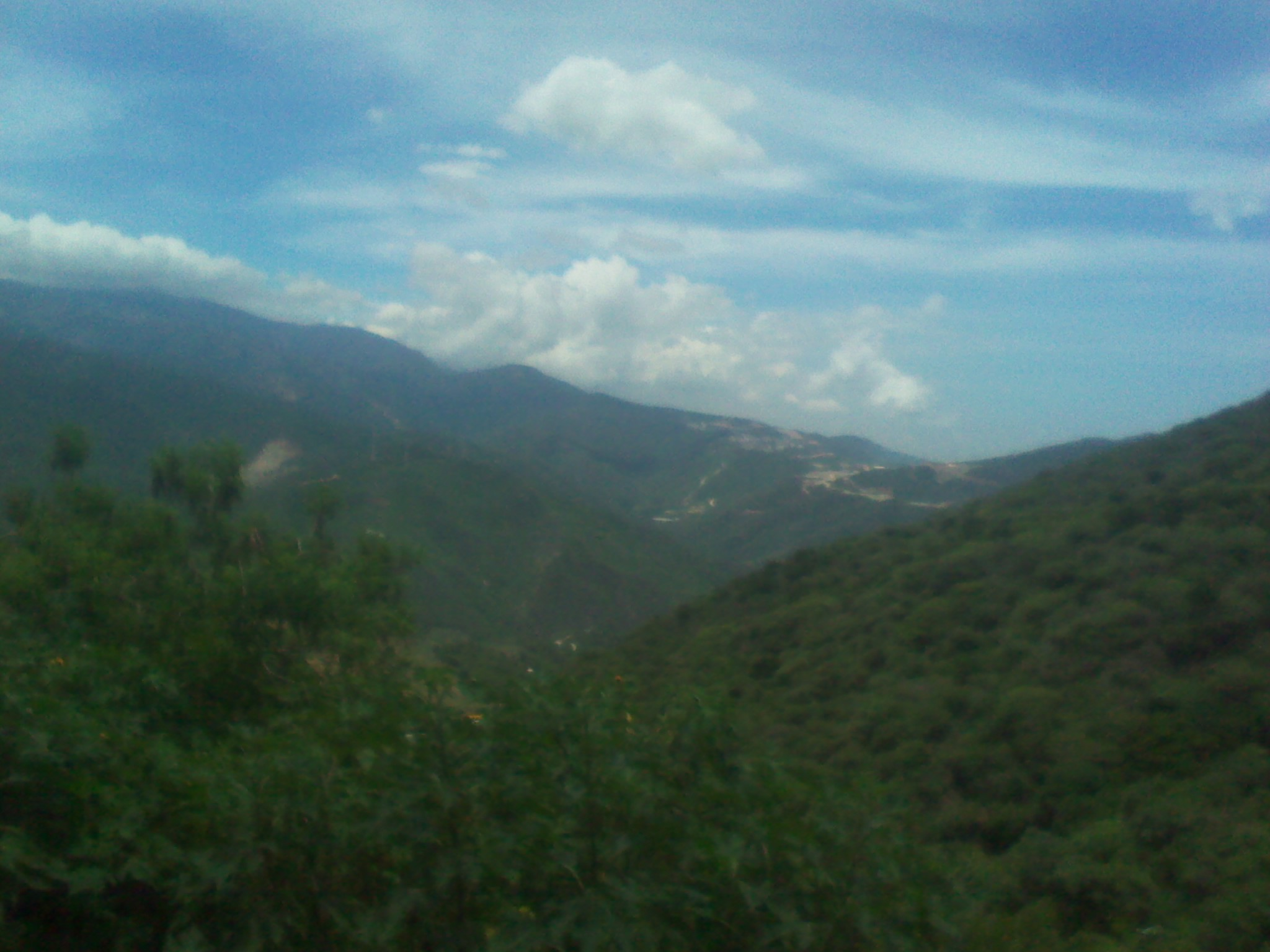 Hermosa vista desde la carretera vieja Caracas-LaGuaira